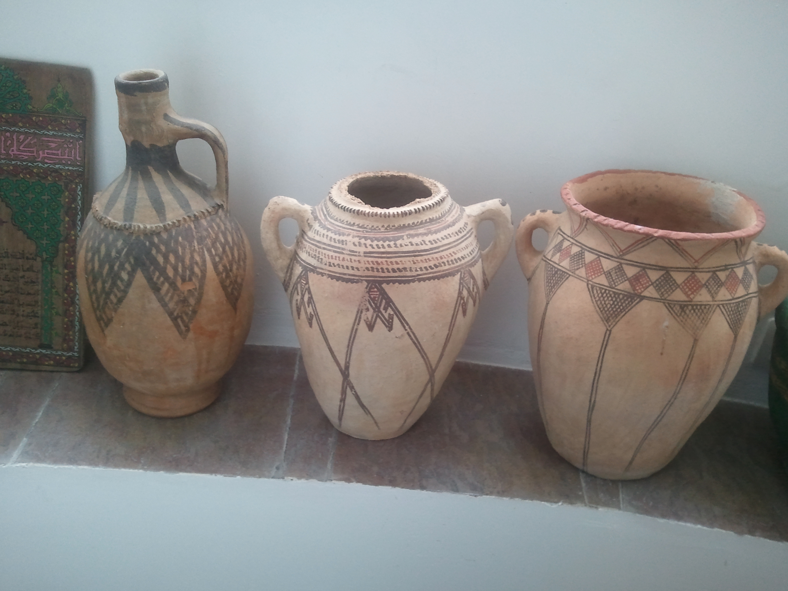 Cerámica rifeña, Marruecos.